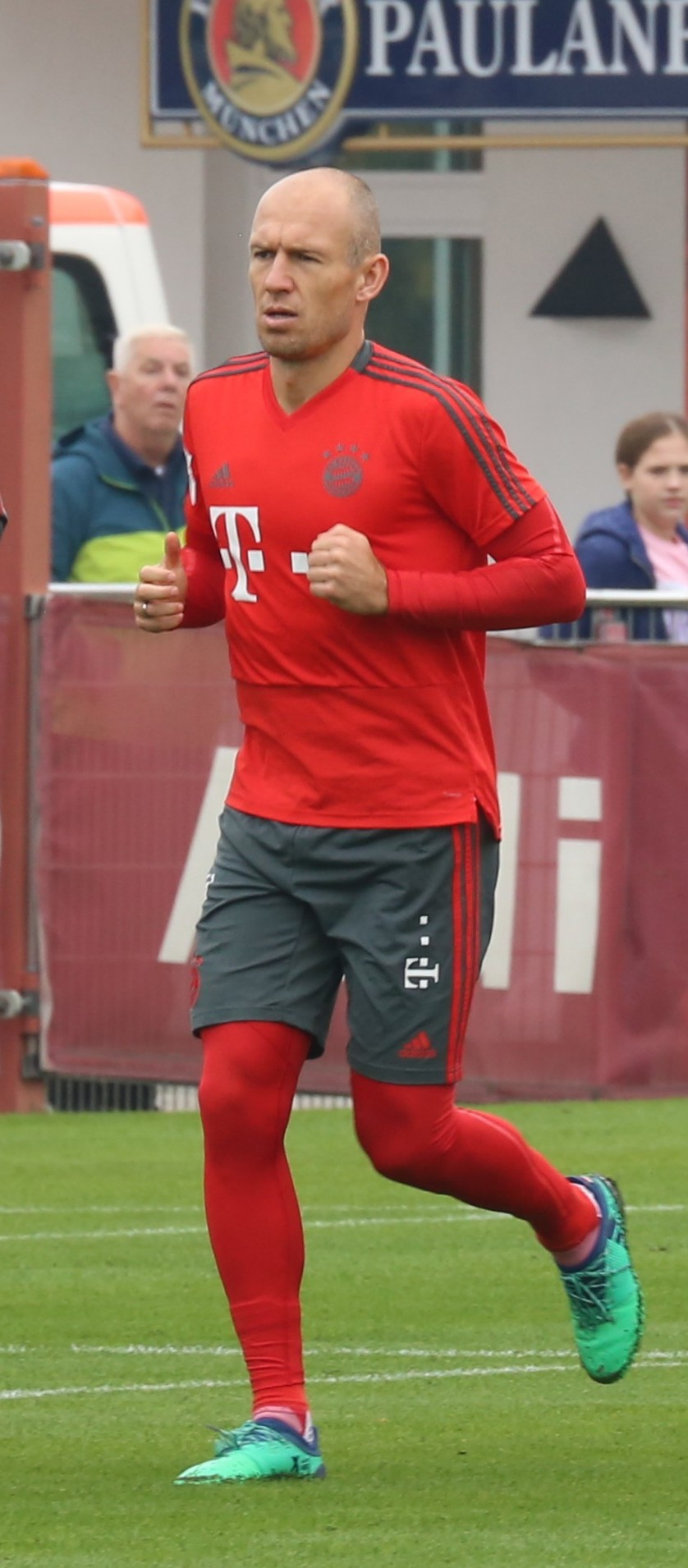 Arjen Robben, am 9. Oktober 2018 beim Training auf dem Gelände des FC Bayern München